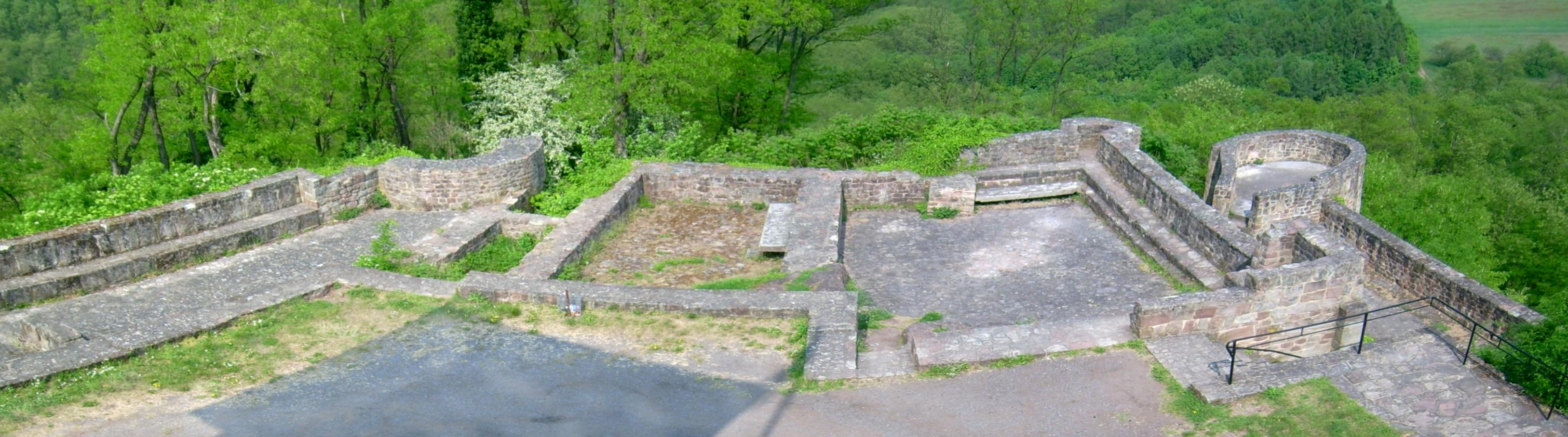 Gemäuer der Teufelsburg